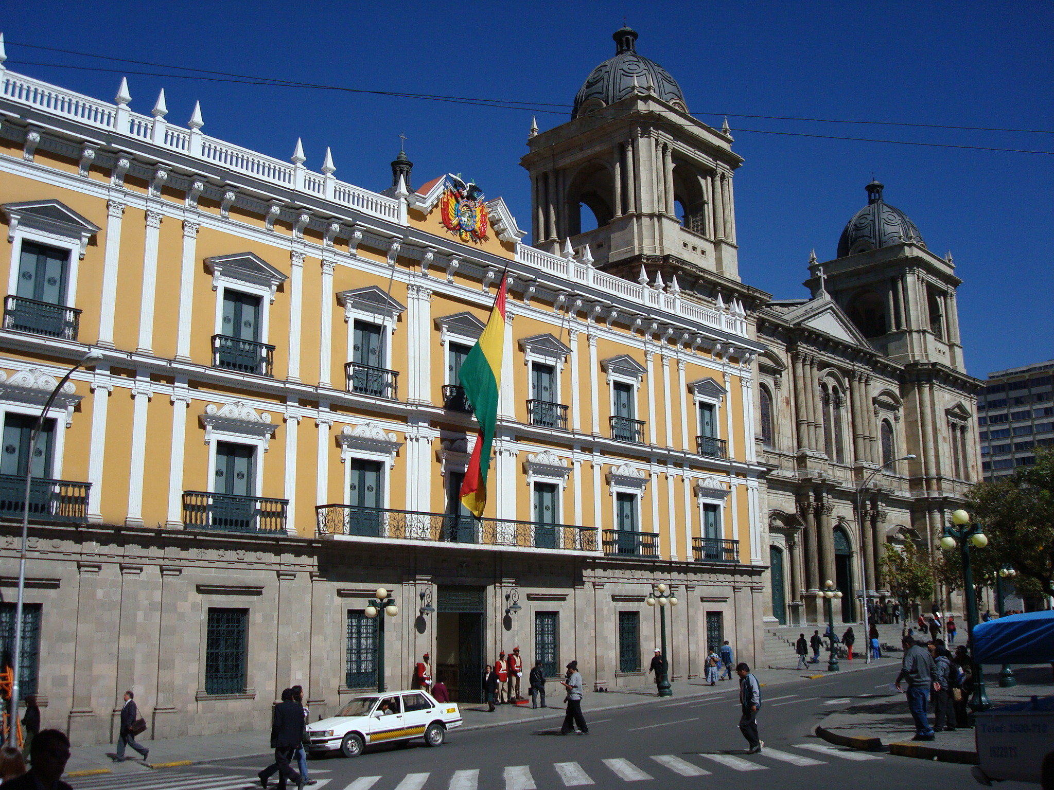 Costado derecho del Palacio de Gobierno de Bolivia.